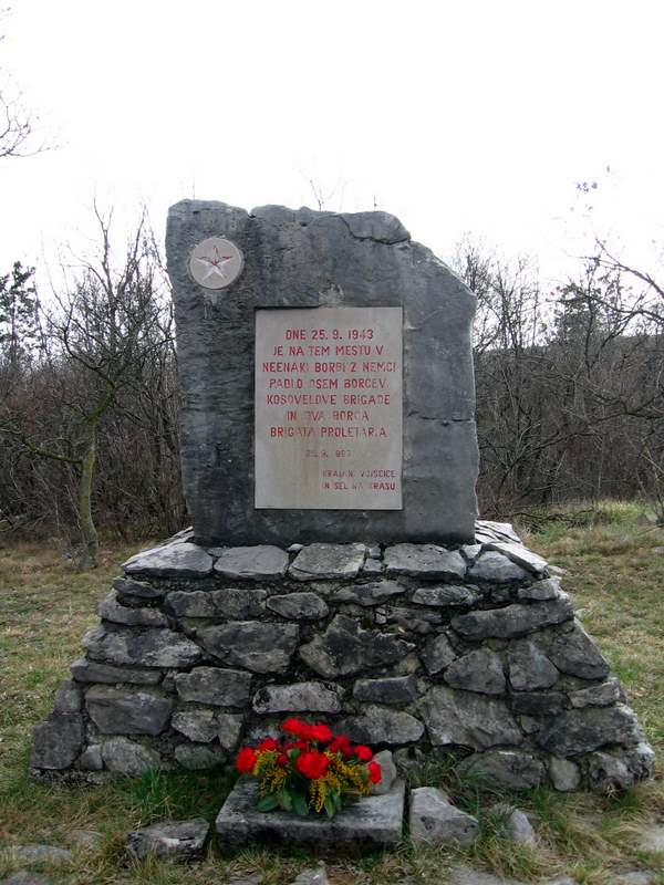 Spomenik